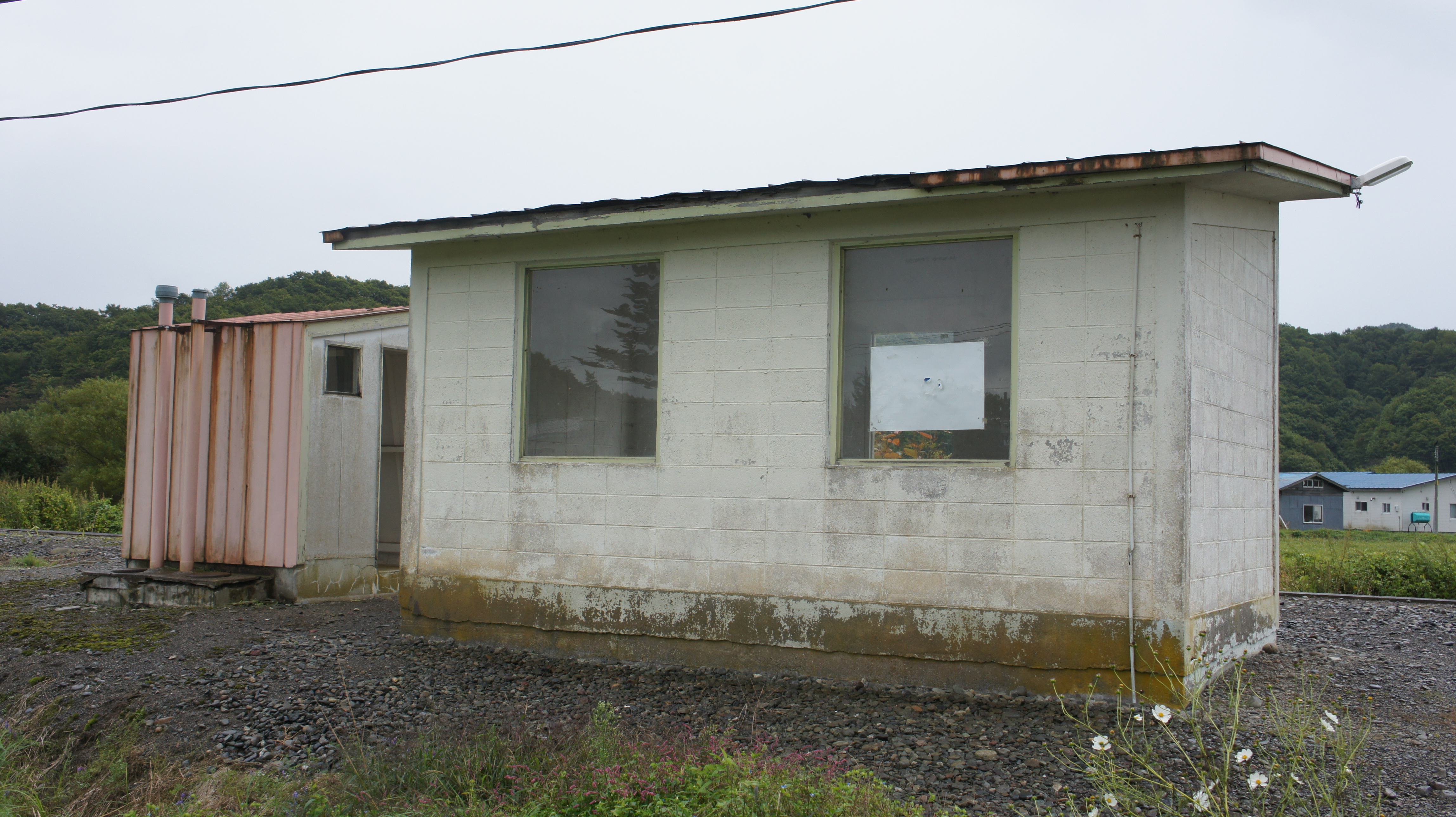 JR日高本線・日高東別駅の待合室